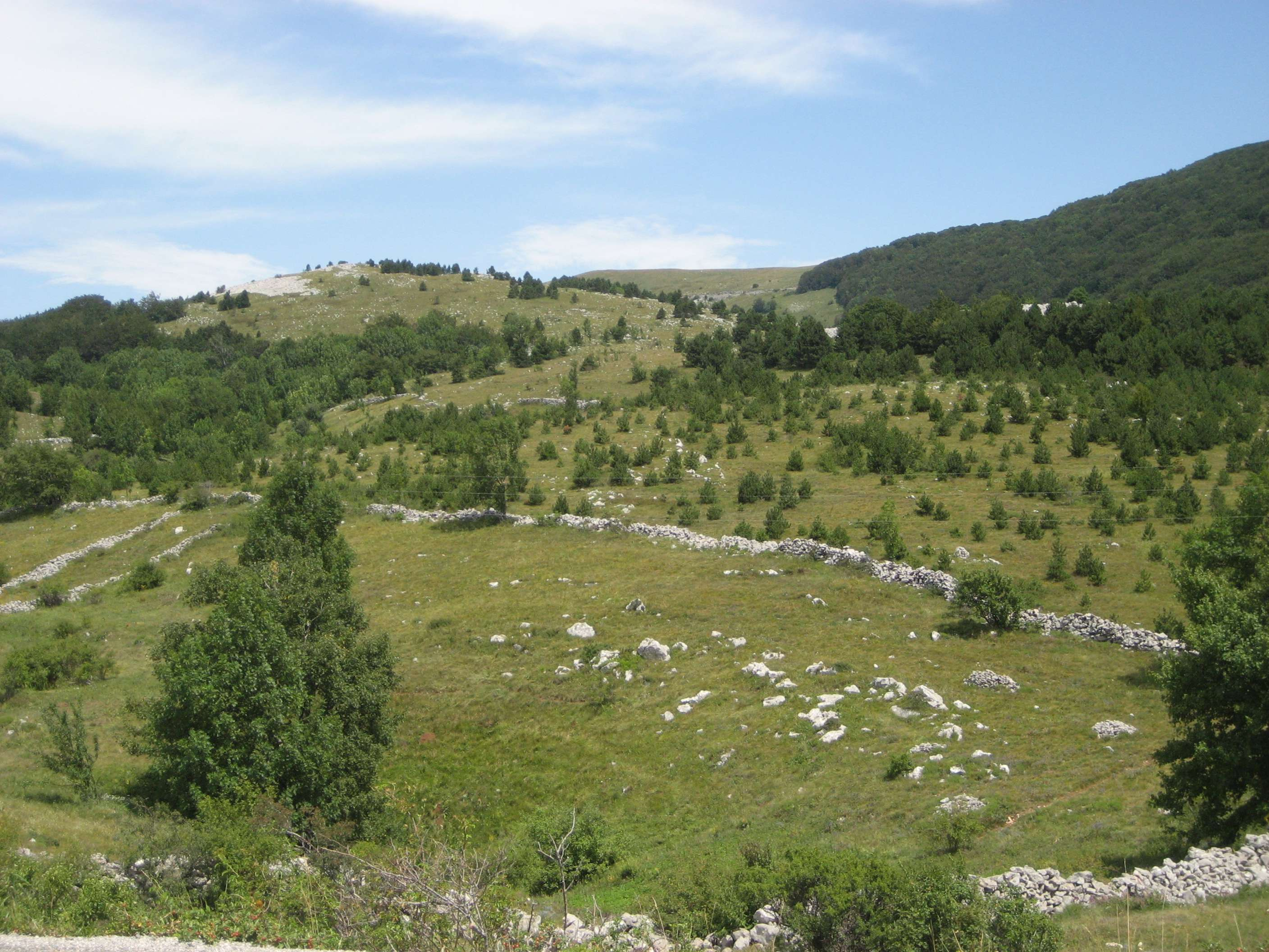 Trockenmauern, Velebit